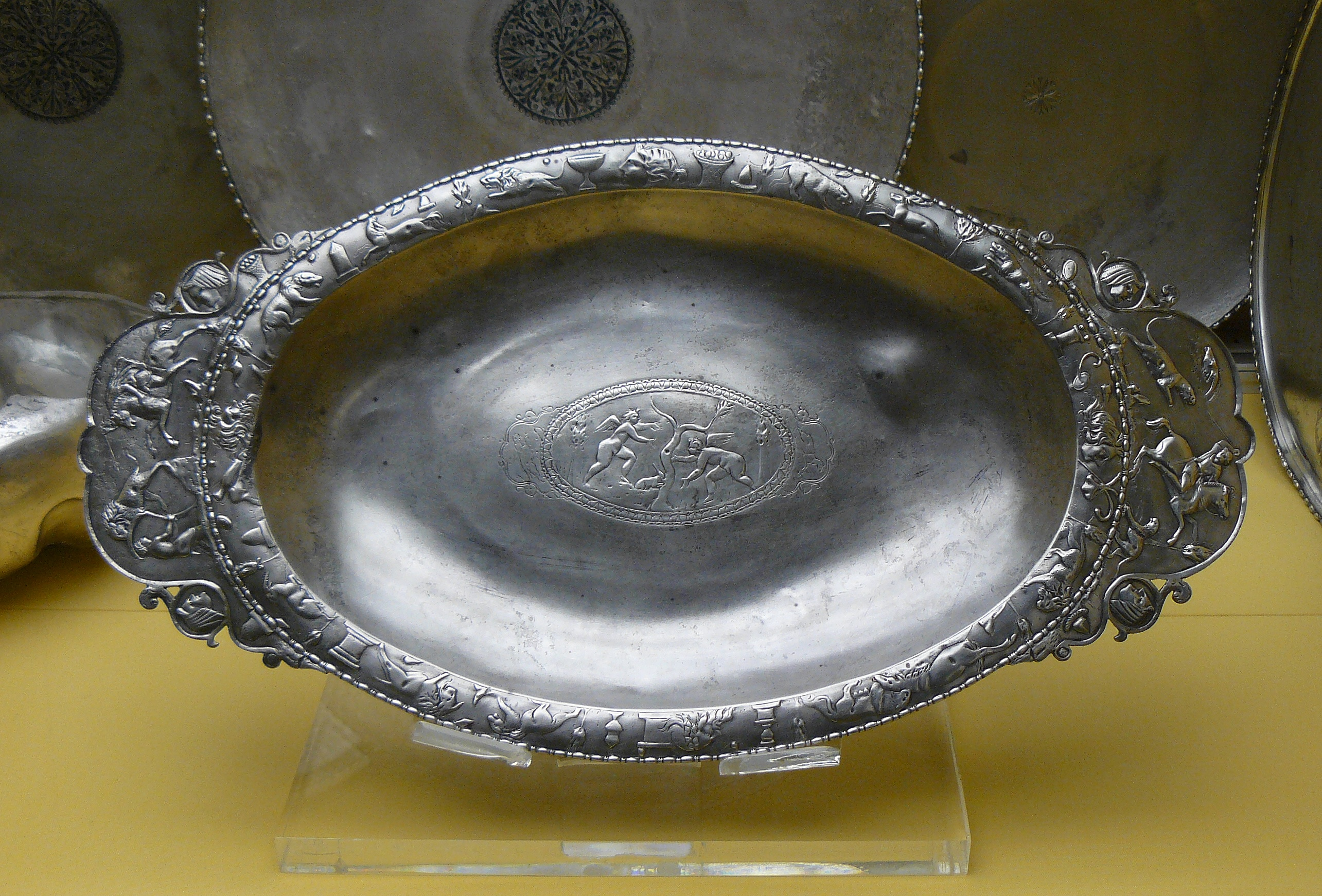 Plat en argent du trésors d'argenterie de Rethel - largeur env. 30 cm. - découvert en 1980 à Rethel, Ardennes, France - vers 270-280 ap. J.C. - M.A.N. St-Germain-en-Laye